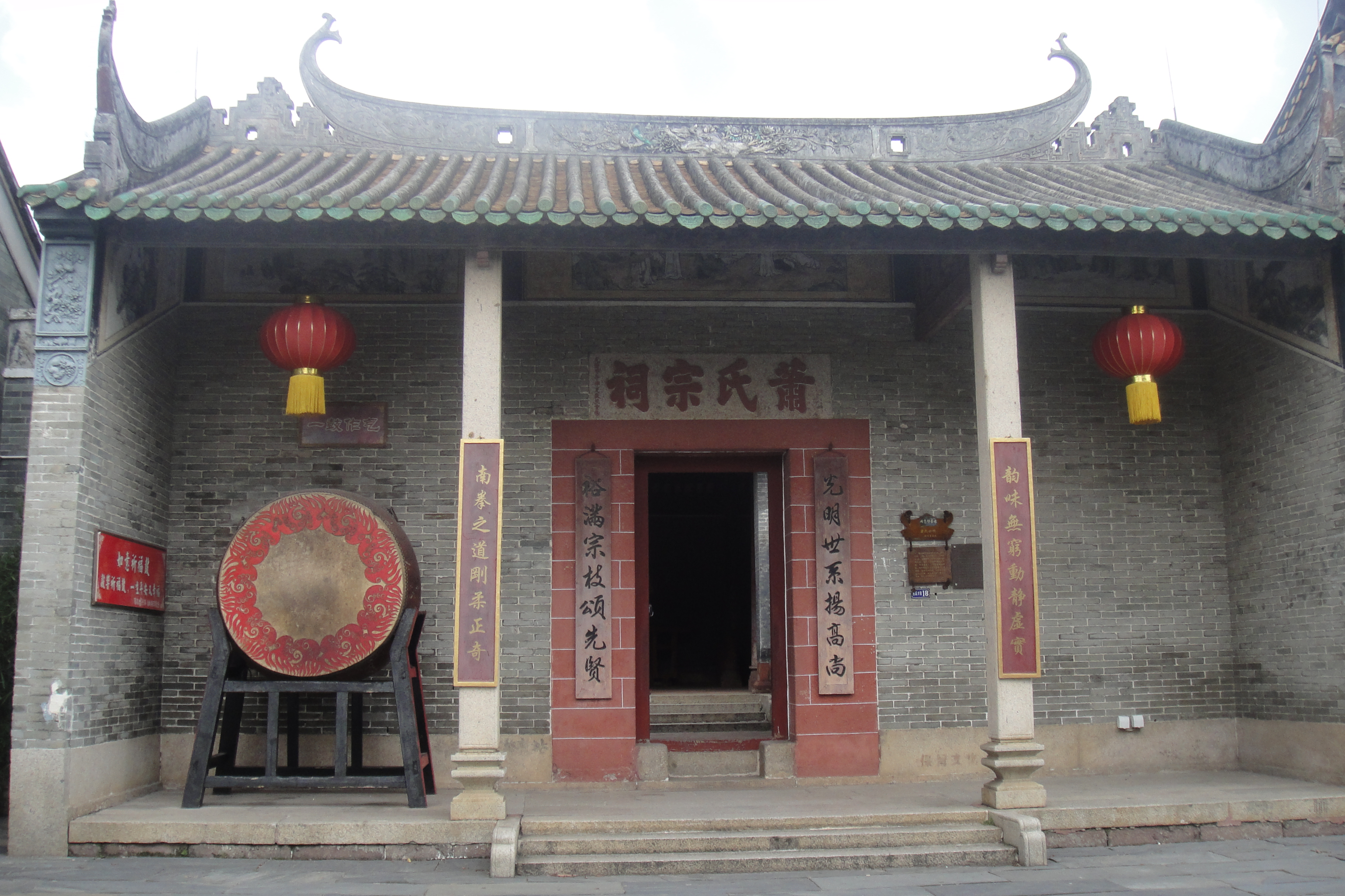 中文（香港）: 位於嶺南印象園。